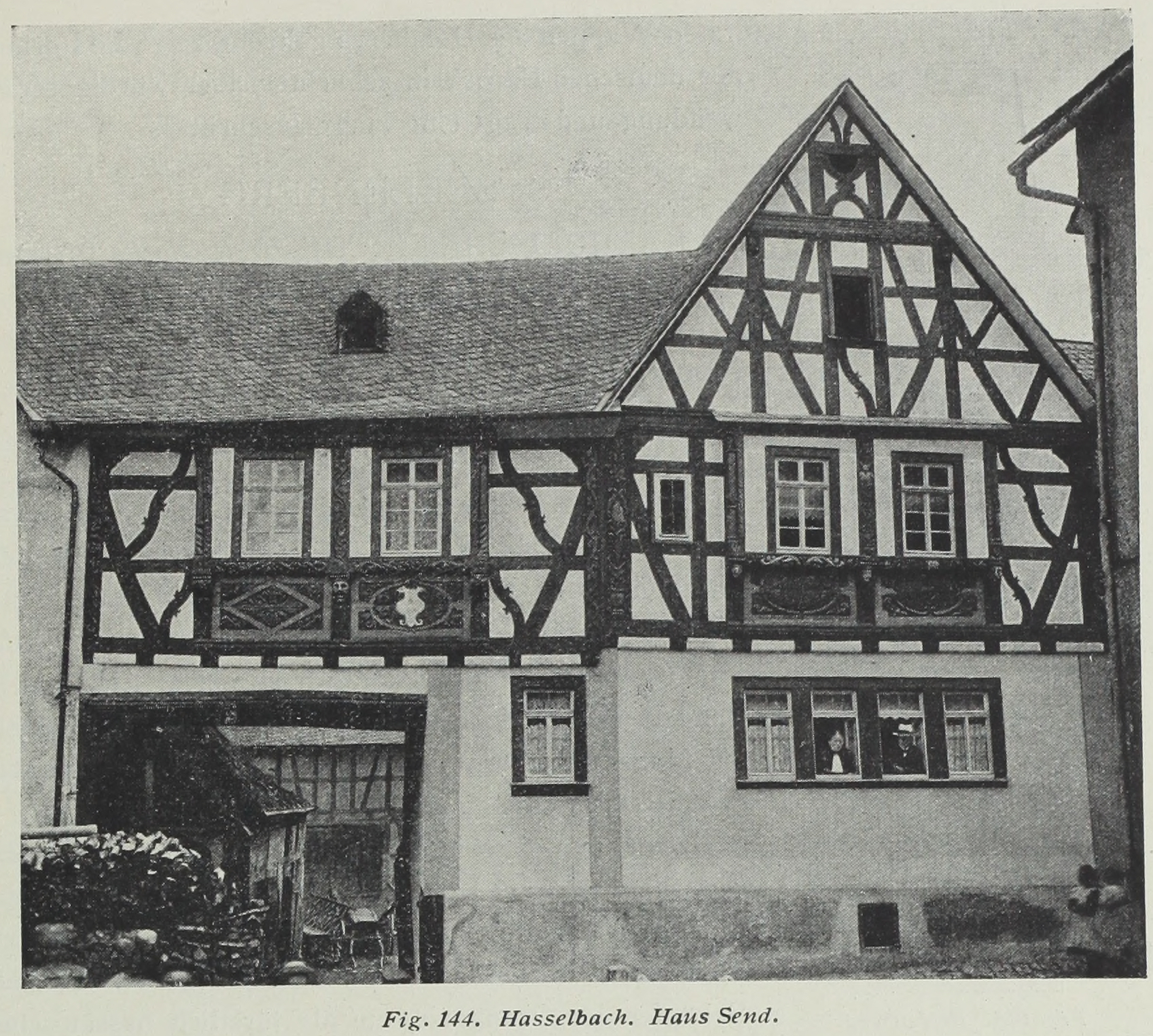 Hasselbach Haus Send